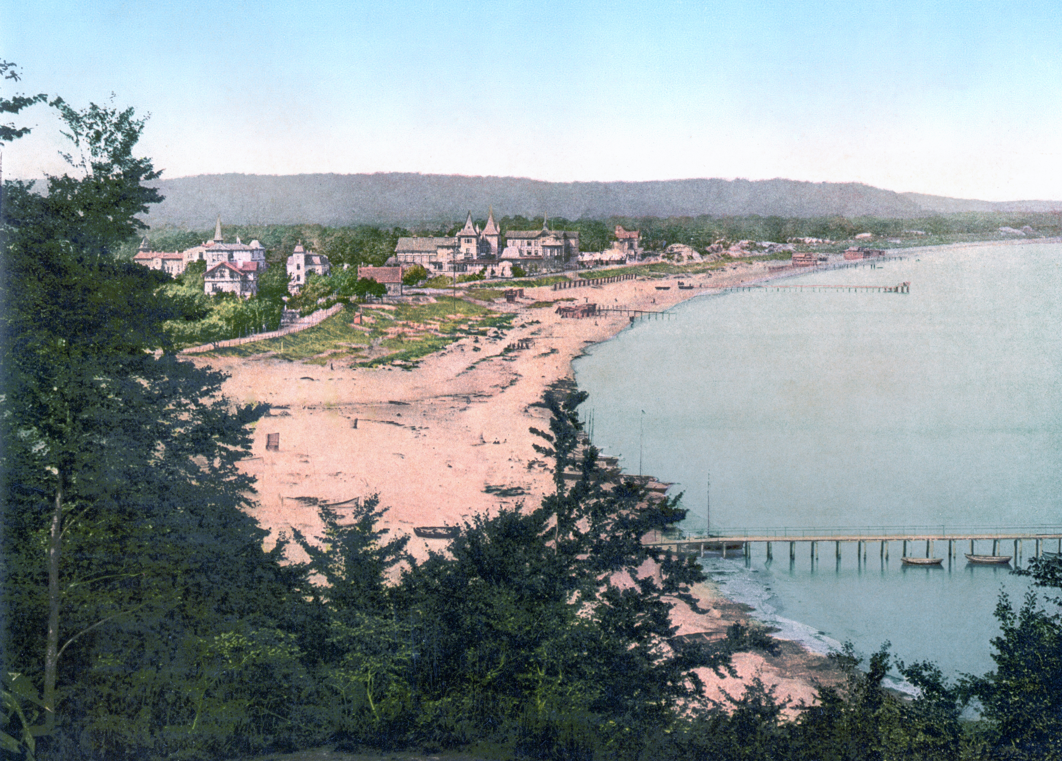 Binz